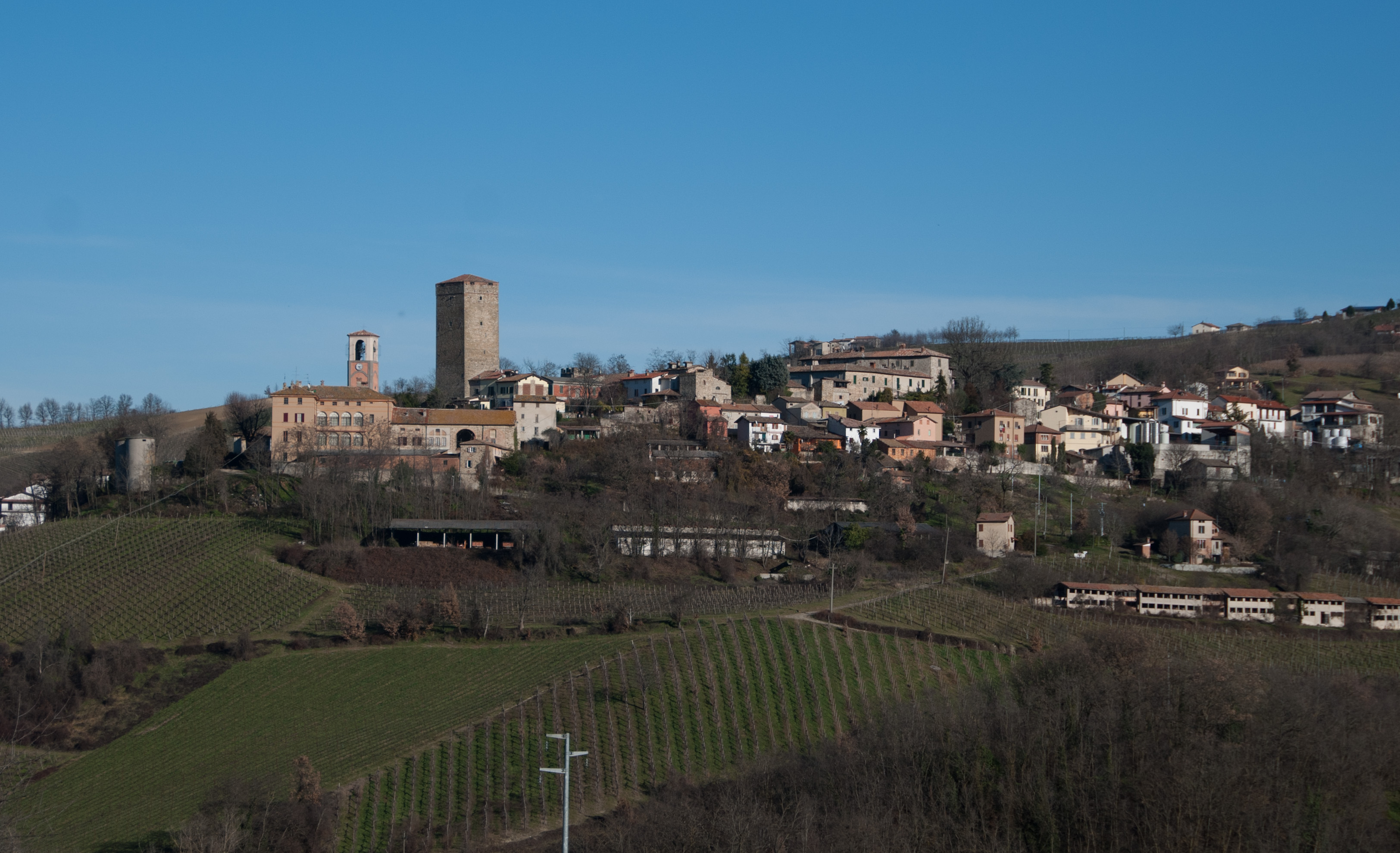 Frazione Soriasco,comune di Santa Maria Della Versa (Pv)